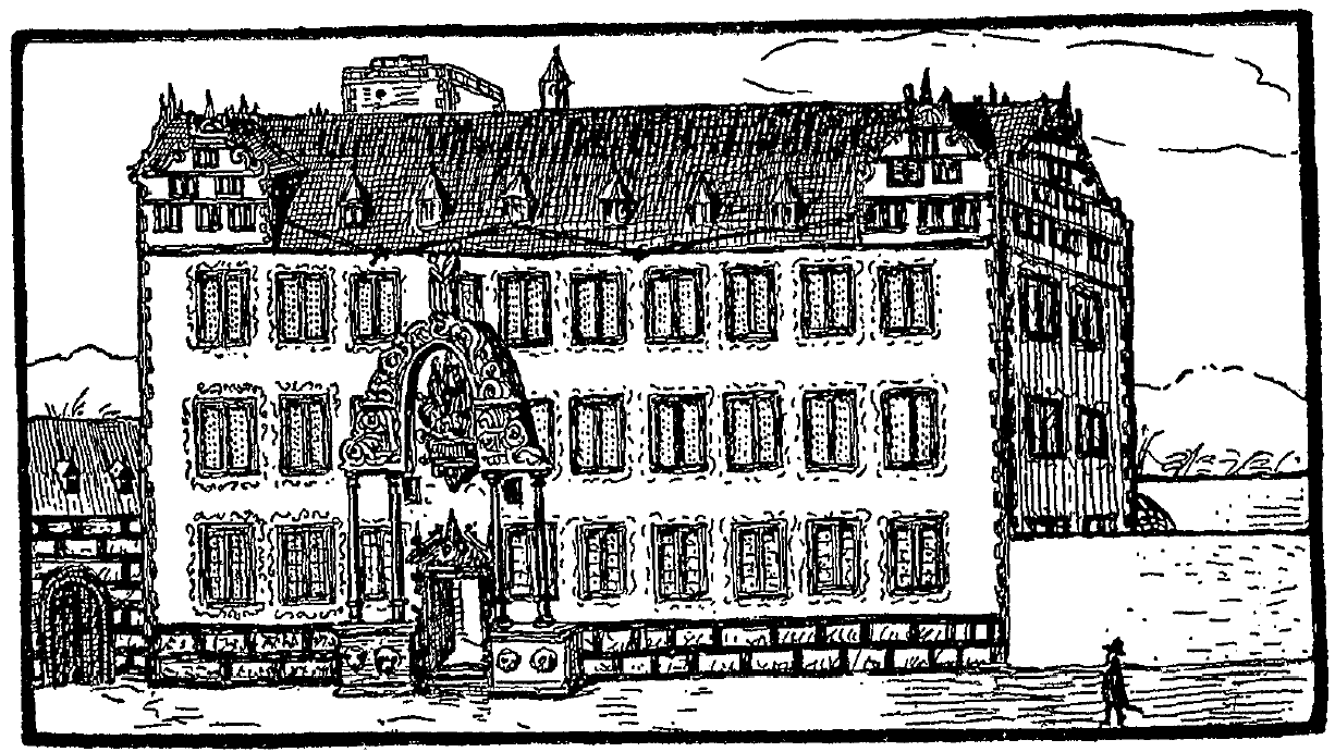 Kollegiengebäude der Universität Gießen um 1615. Nachzeichnung einer Abbildung in dem Stammbuche Nr. 122 der Sammlung der Großherz. Bibliothek in Weimar.